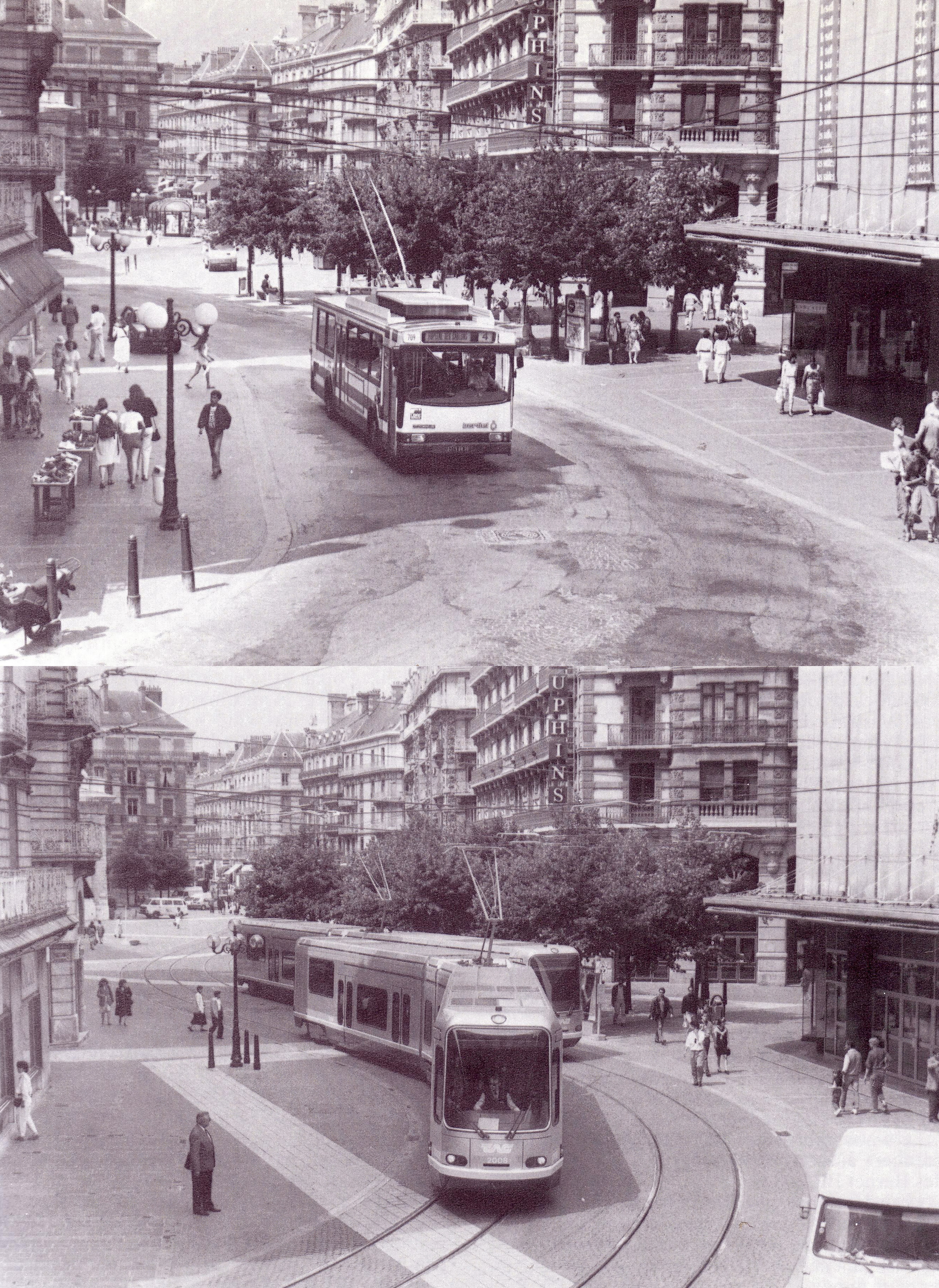 La rue Félix Poulat à Grenoble avant et après le retour du tram à Grenoble en 1988.